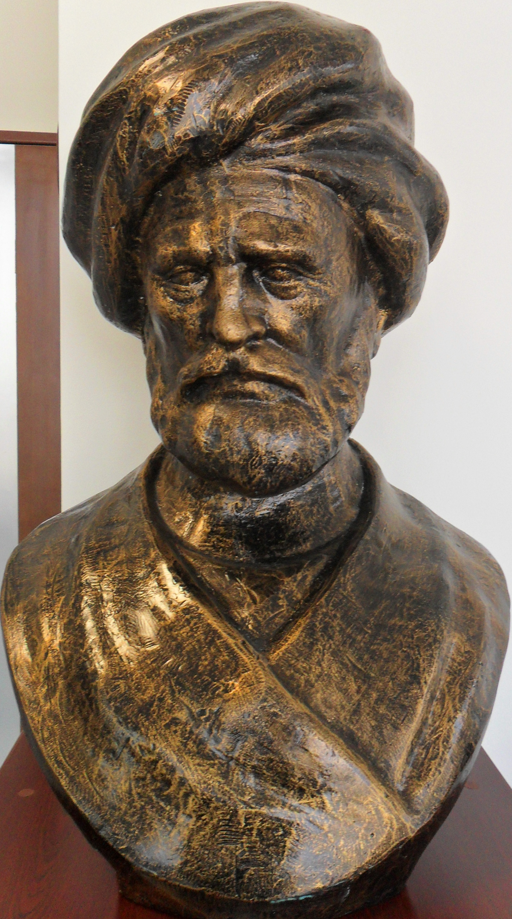 Mersin Deniz Müzesinde bulunan Cezayirli Gazi Hasan Paşa büstü.